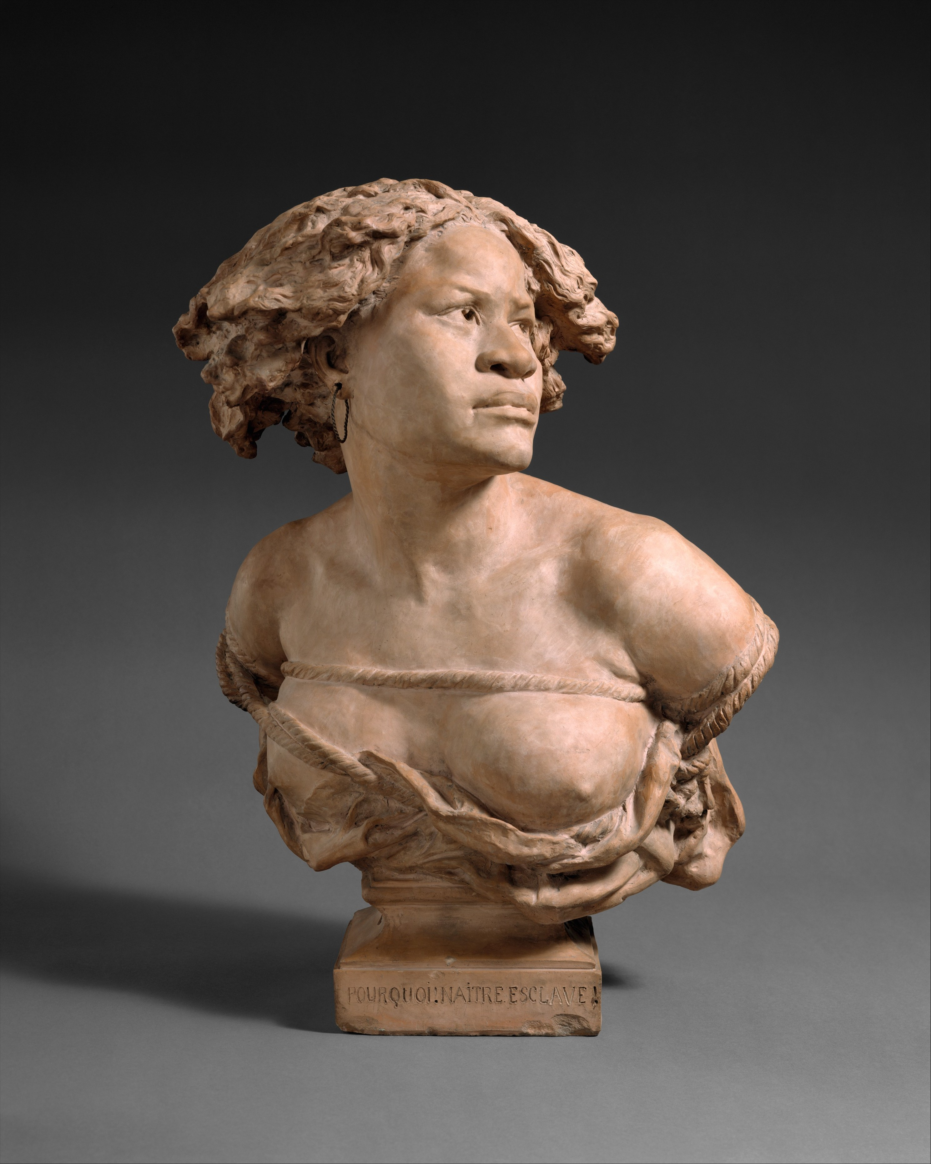 French, Auteuil; Bust; Sculpture